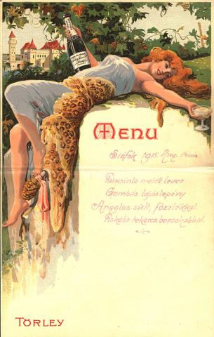 Menu